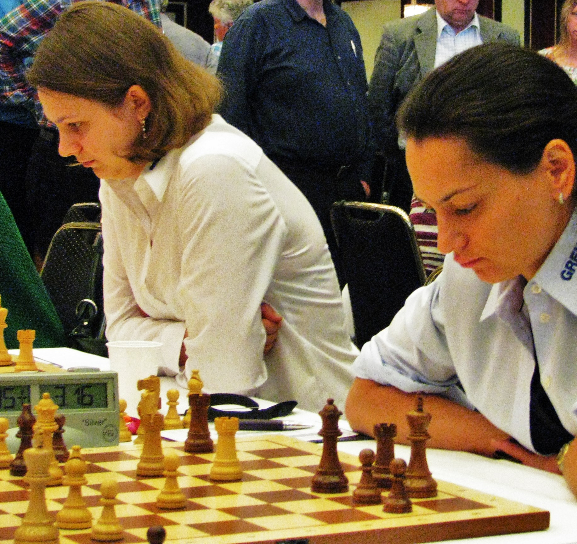 Alexandra Kosteniuk und Anna Muzychuk am 1. Mai 2017 in Berlin